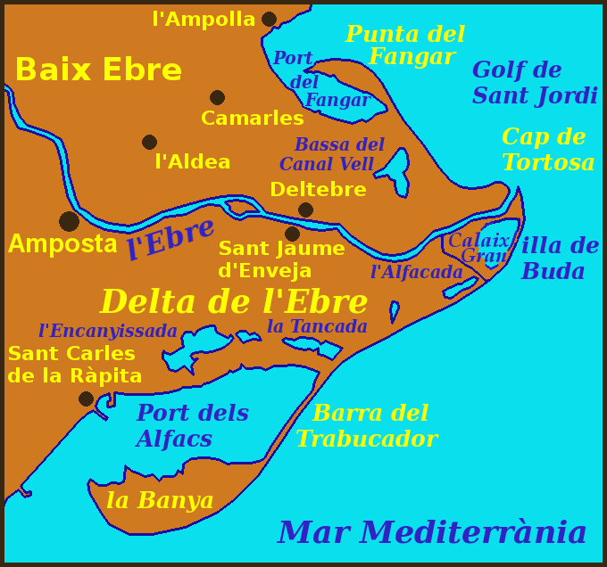 Imatge del Delta de l'Ebre